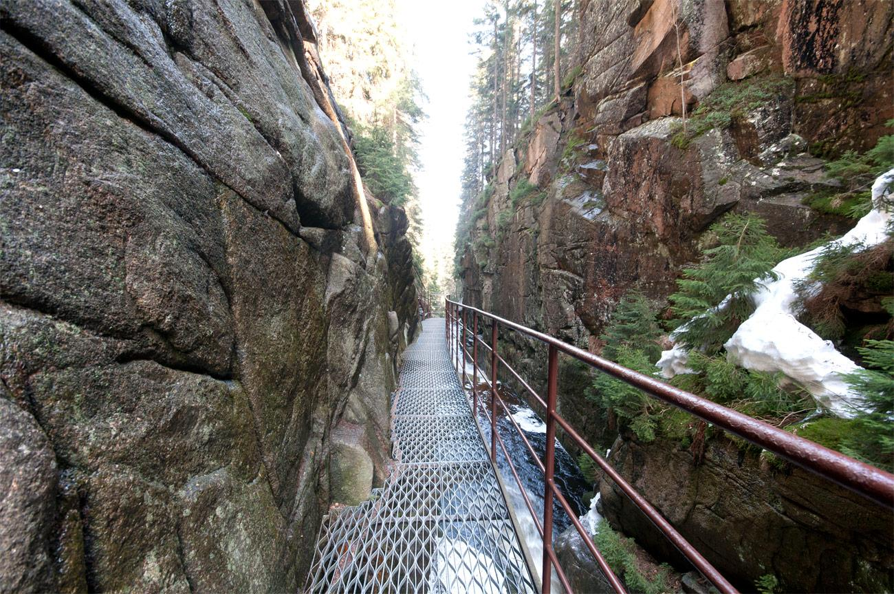 Kładka, którą dojdziemy spod schroniska do wodospadu (na dno wąwozu).